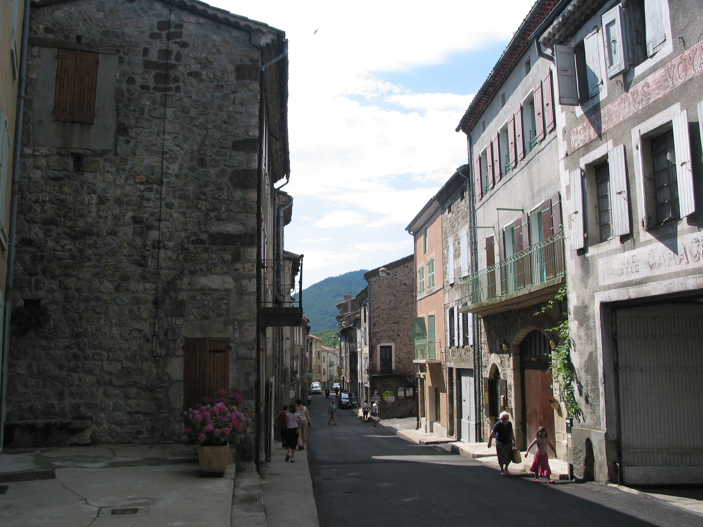 Rue principale de Montpezat-sous-Bauzon, en juillet 2004.